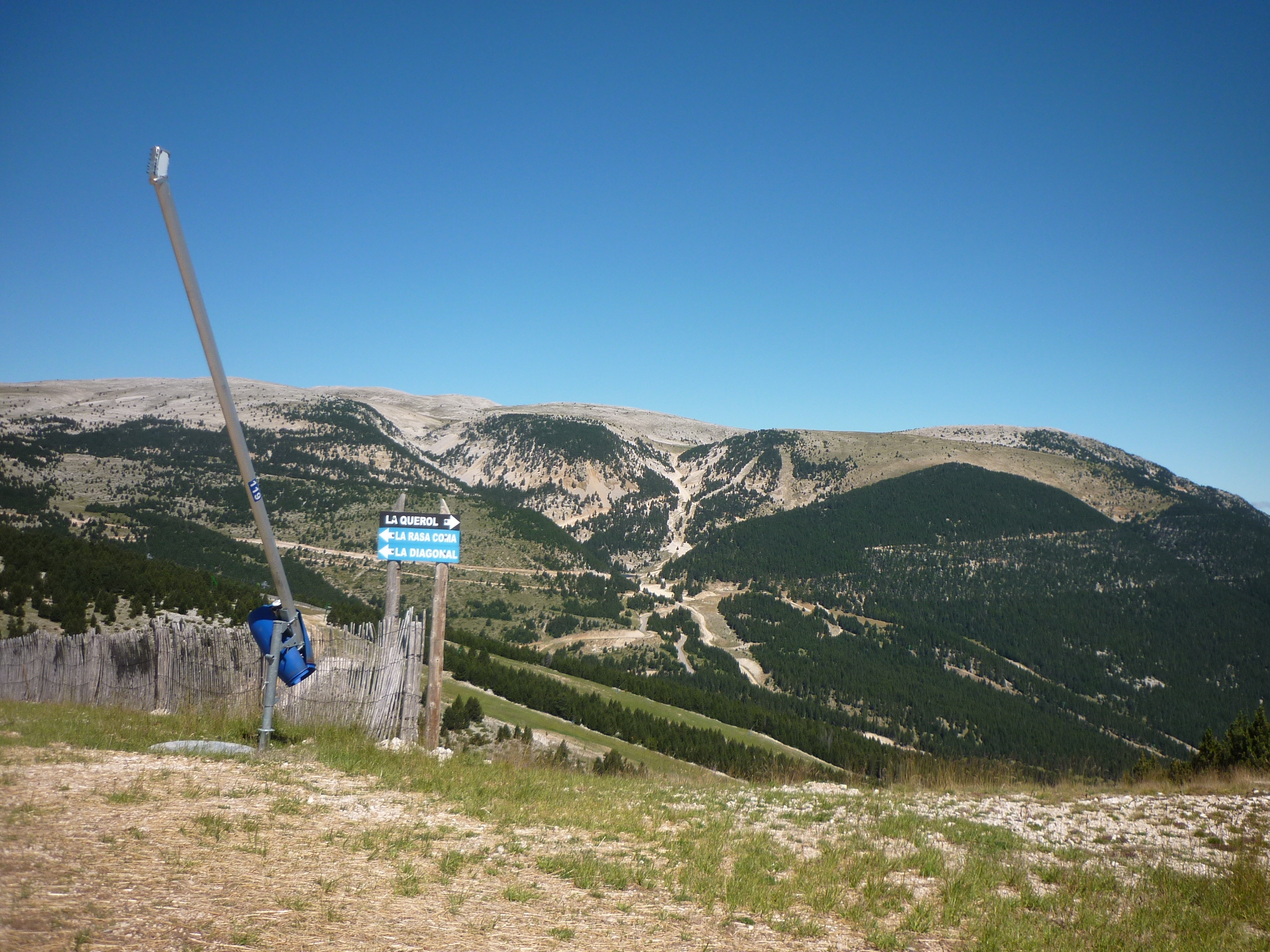 Carena de la serra del Port del Comte des del Vulturó, a l'esquerra, fins a l'Estivella, a la dreta.